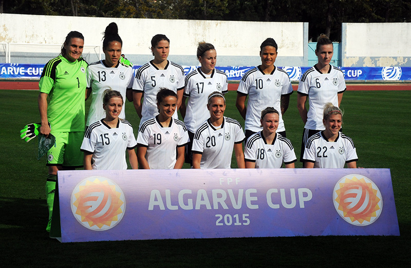 a_34_5035